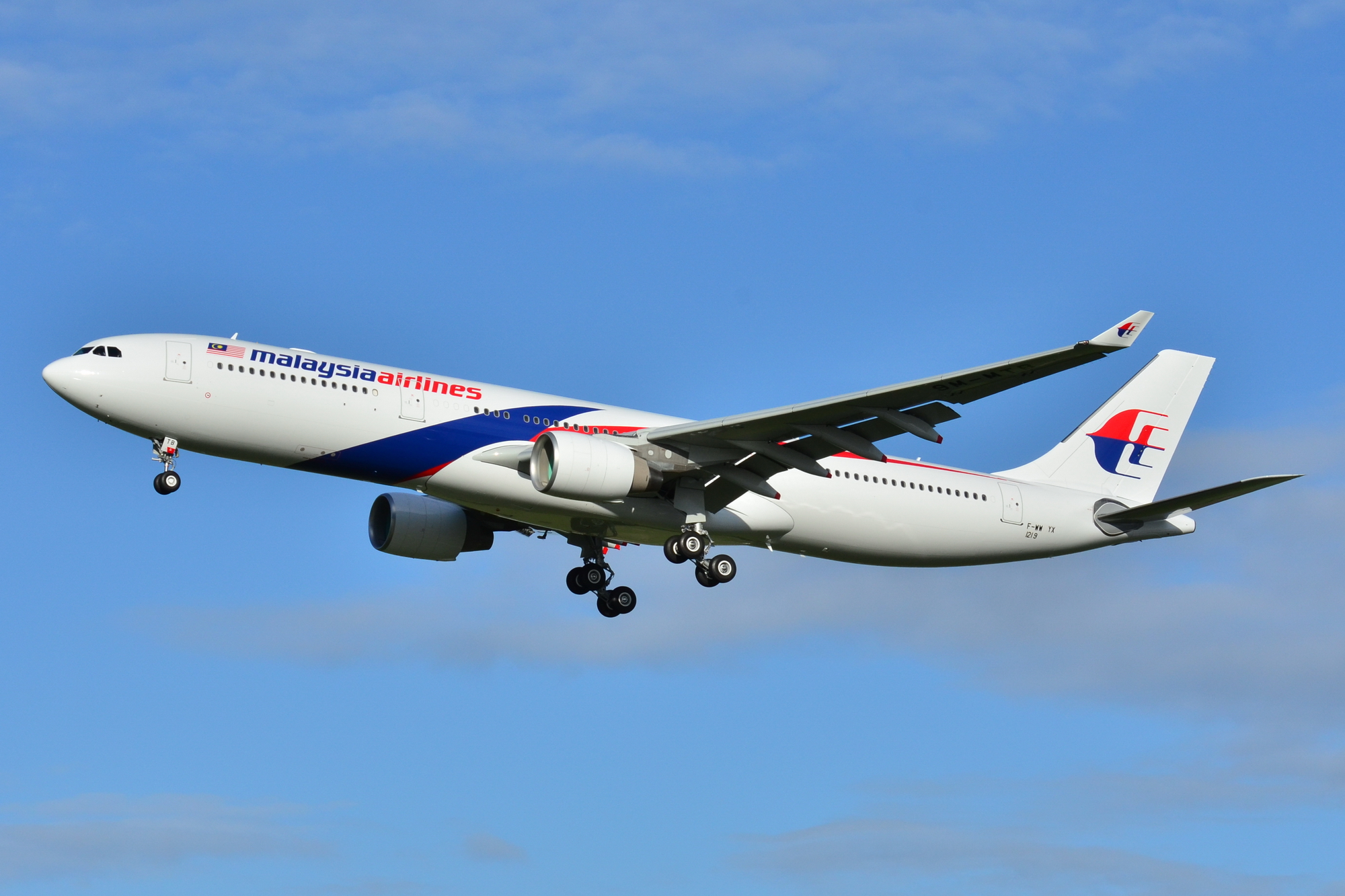 Photo prise à l'aéroport de Toulouse-Blagnac (LFBO) en France. Picture take at Toulouse-Blagnac Airport (LFBO) in France.